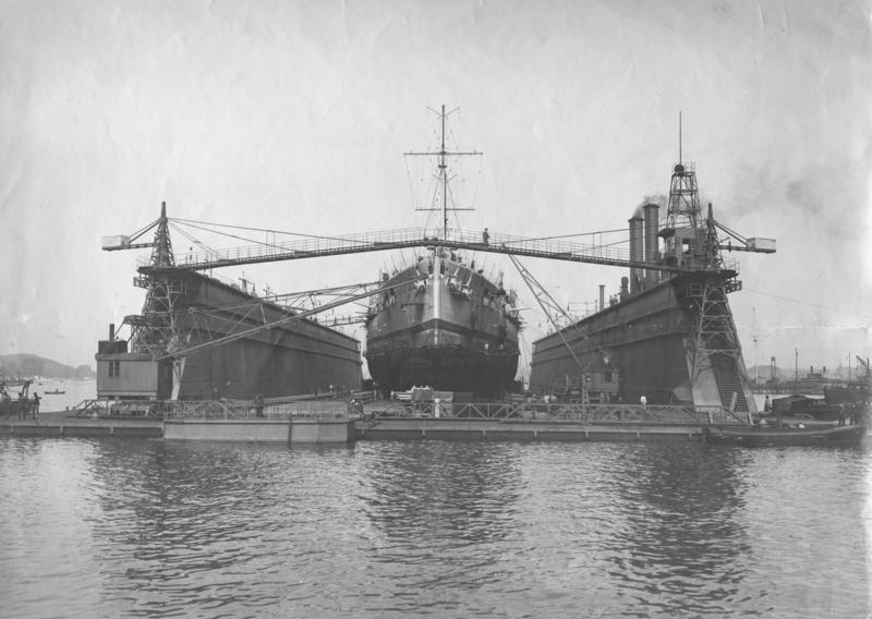 40000 t = Schwimmdock der Kaiserlichen Werft Kiel mit Linienschiff "Helgoland" (Erbaut von der Howaldtwerft zu Kiel)